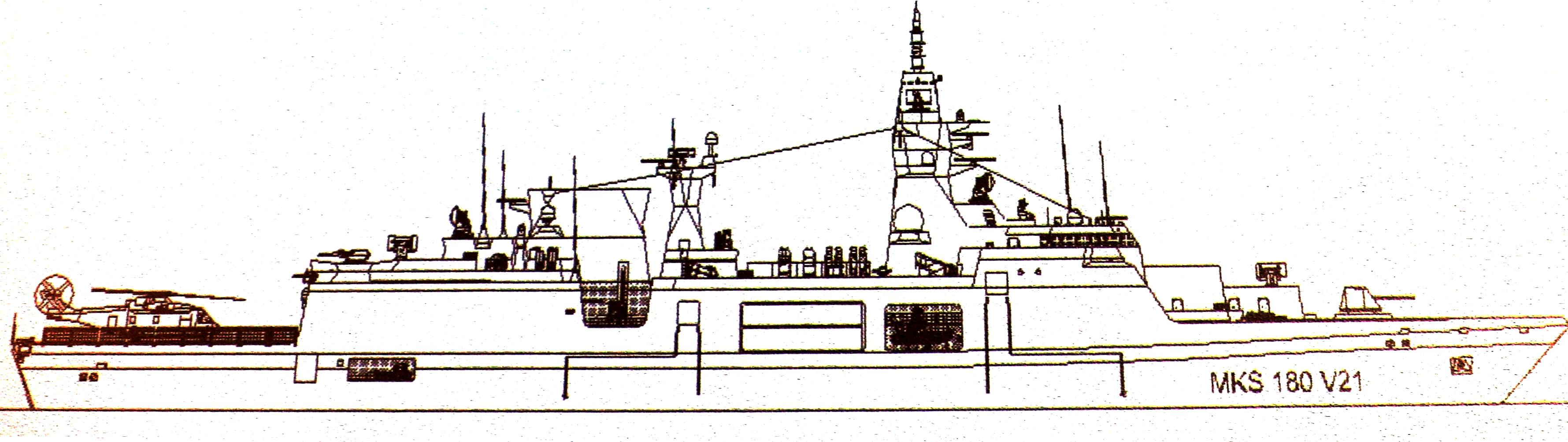 Beispielsentwurf vom MKS 180